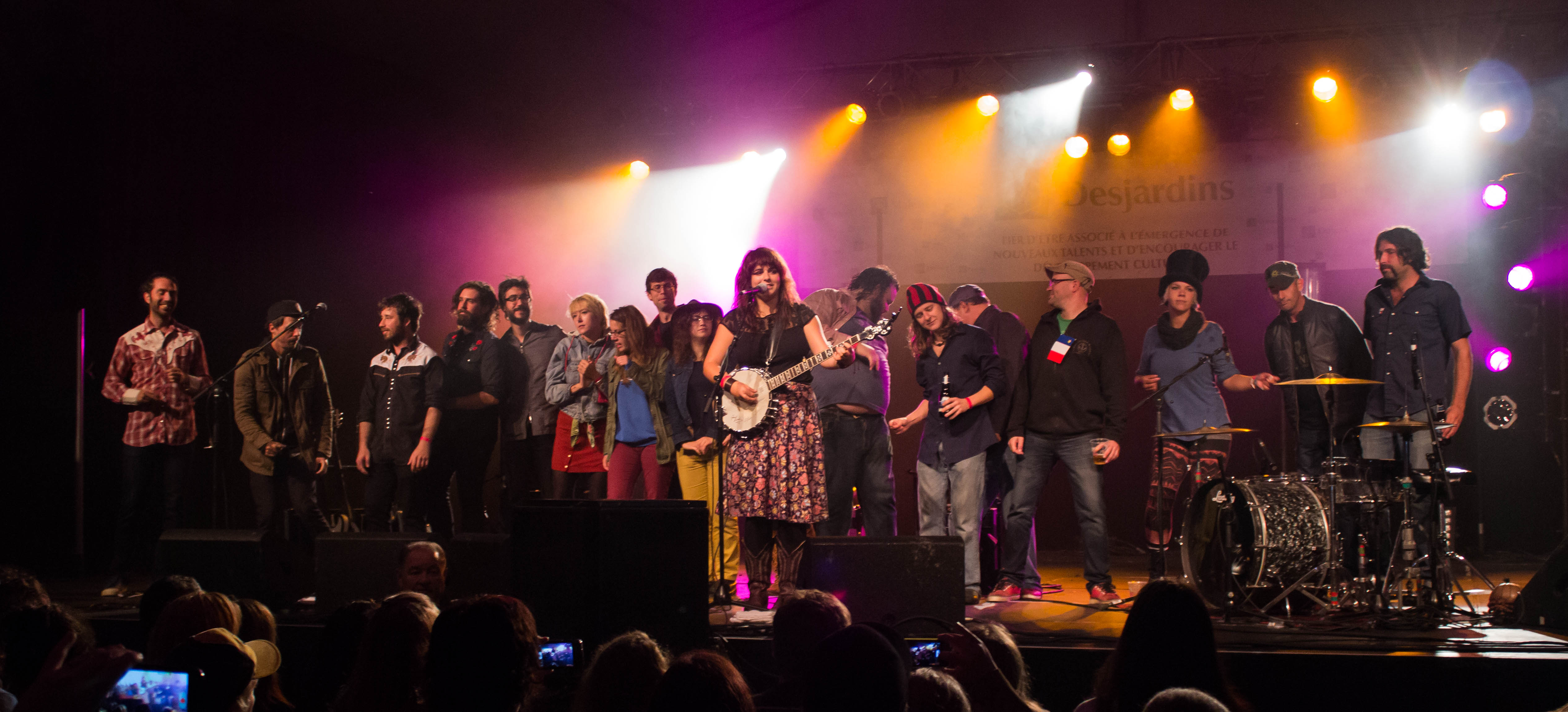 Finale de la soirée acadienneau Festival international de la chanson de Granby 2013, place Johnson.